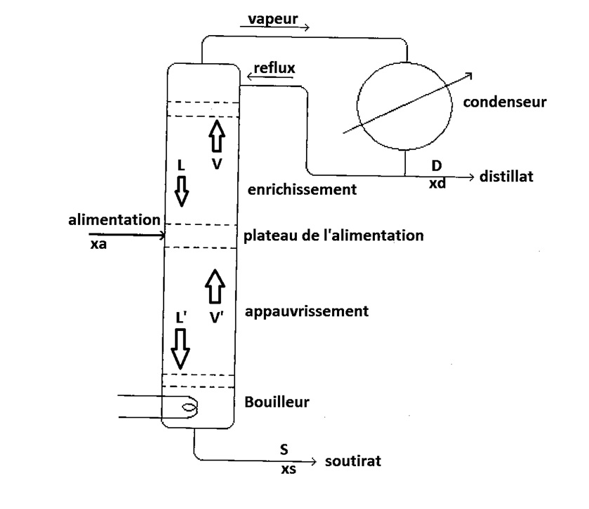 schéma rectification génie chimique